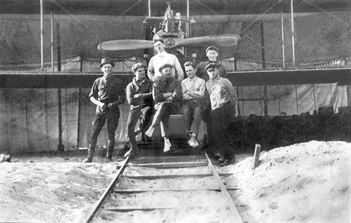 Een Glenn Martin TT voor het KNIL (KNIL'er sergeant Theo van Broeckhuysen midden zittend) met fabrieksmonteurs in Amerika (1917). Foto uit archief Stichting Familie van Broeckhuysen ingeschreven te Hilversum, gevestigd te Den Haag en bij deze vrijgeven.